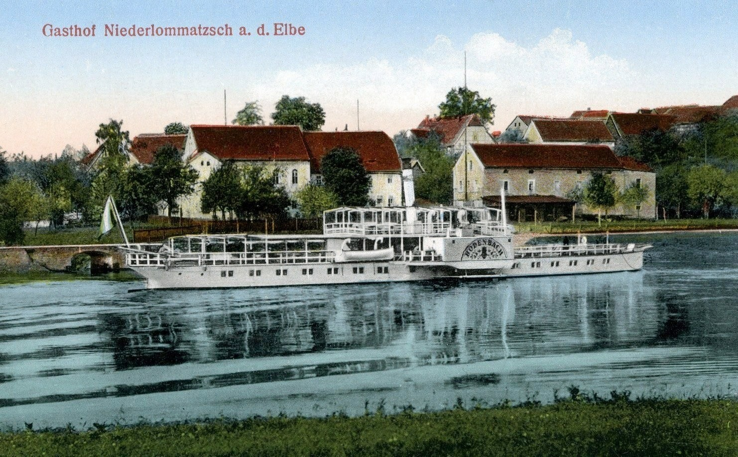 Niederlommatzsch; Gasthof mit Elbe und Dampfer Bodenbach This postcard is from publisher Brück & Sohn in Meißen ( postcard has a unique number 25365 and is available in a higher resolution at the publisher. This images was uploaded in a cooperation project between Wikipedians and the publisher.